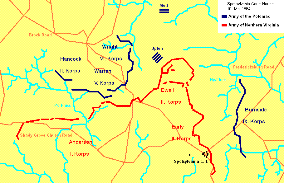 Karte der Schlacht von Spotsylvania Court House. Linien der US- und CS-Truppen am 10.5.1864